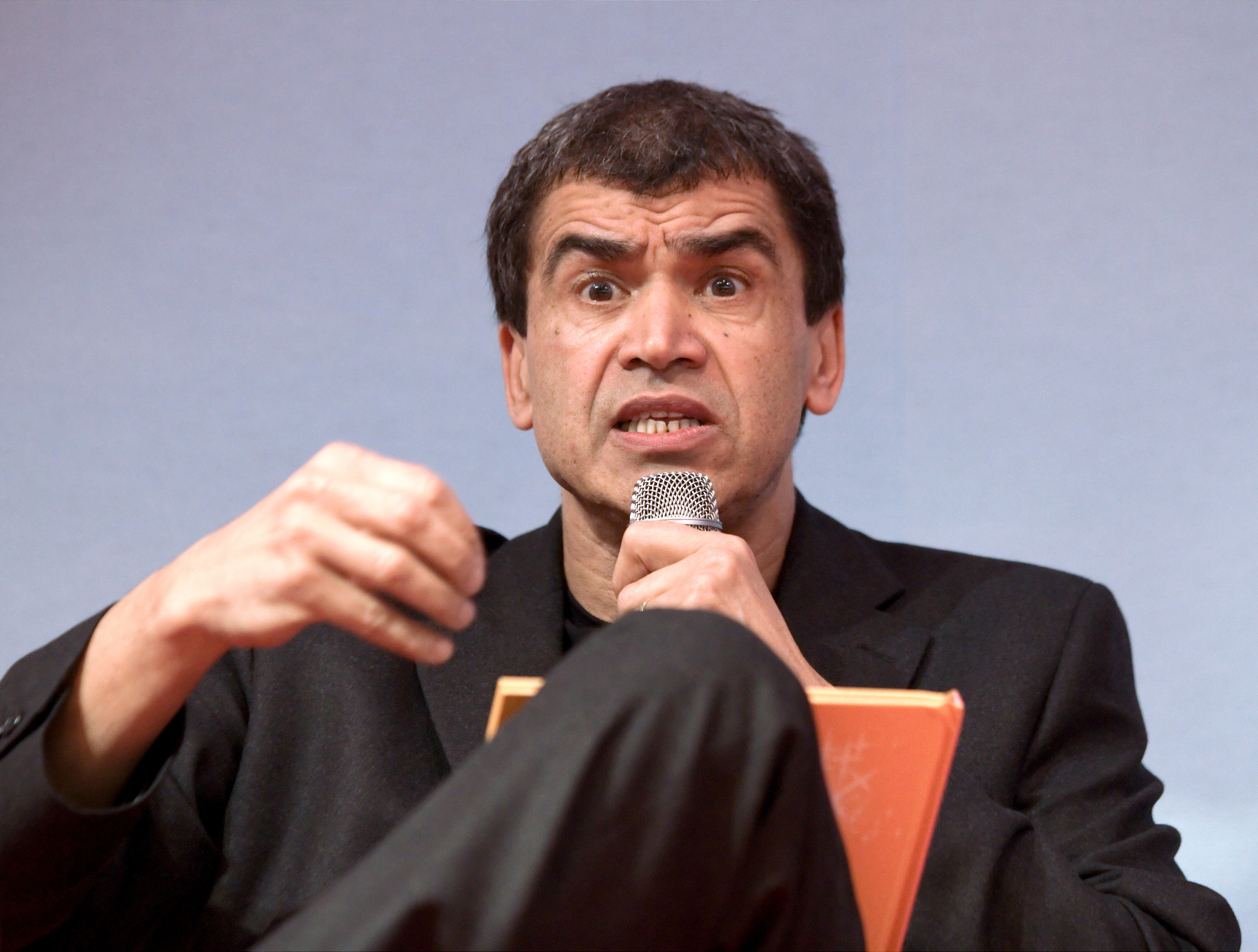 Daniel Picouly au Salon du livre de Paris lors du débat Les émissions culturelles et littéraires : l'audimat, une ambition pas une obsession !